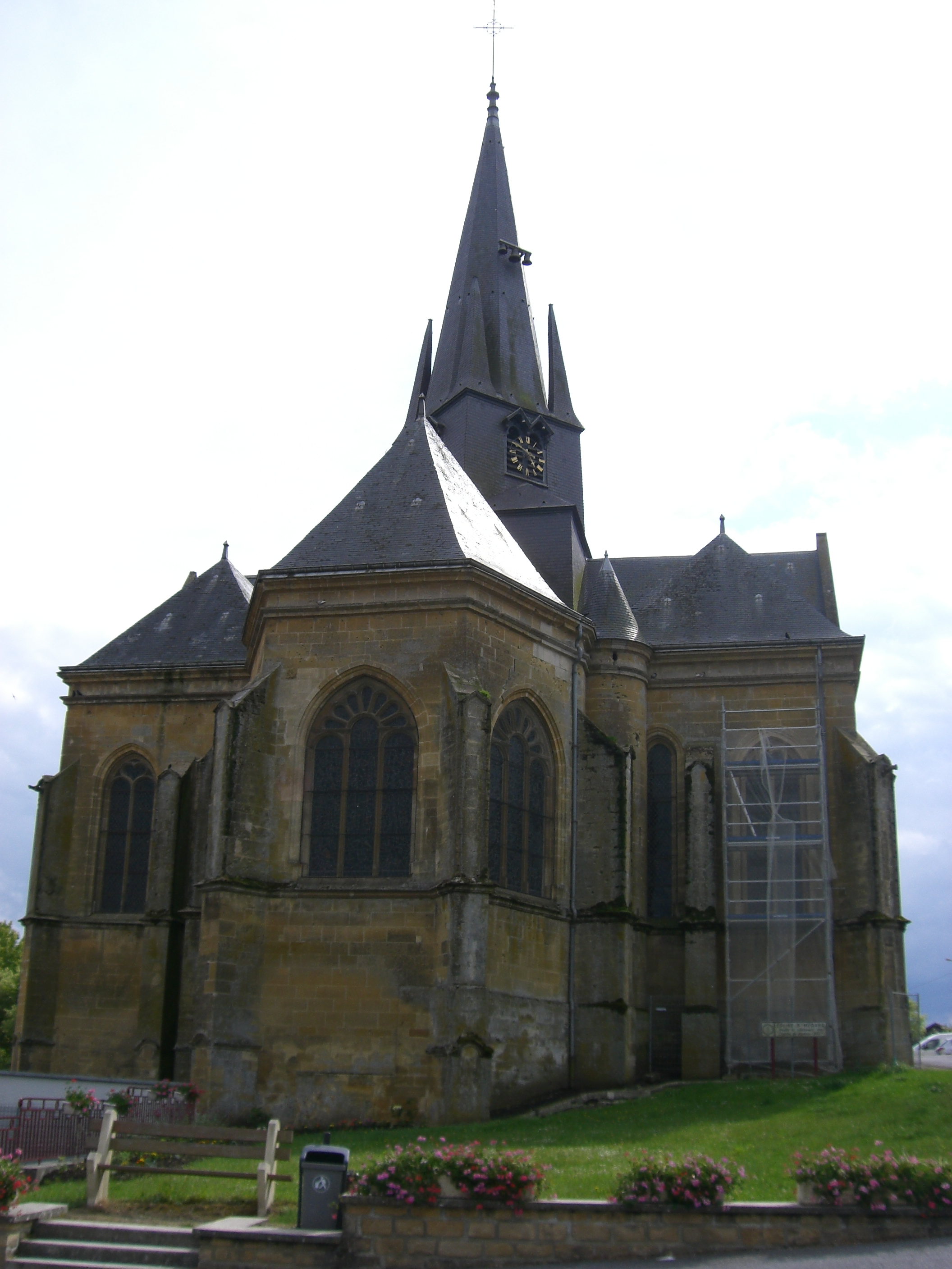 Eglise de Grandpré (Ardennes, France)